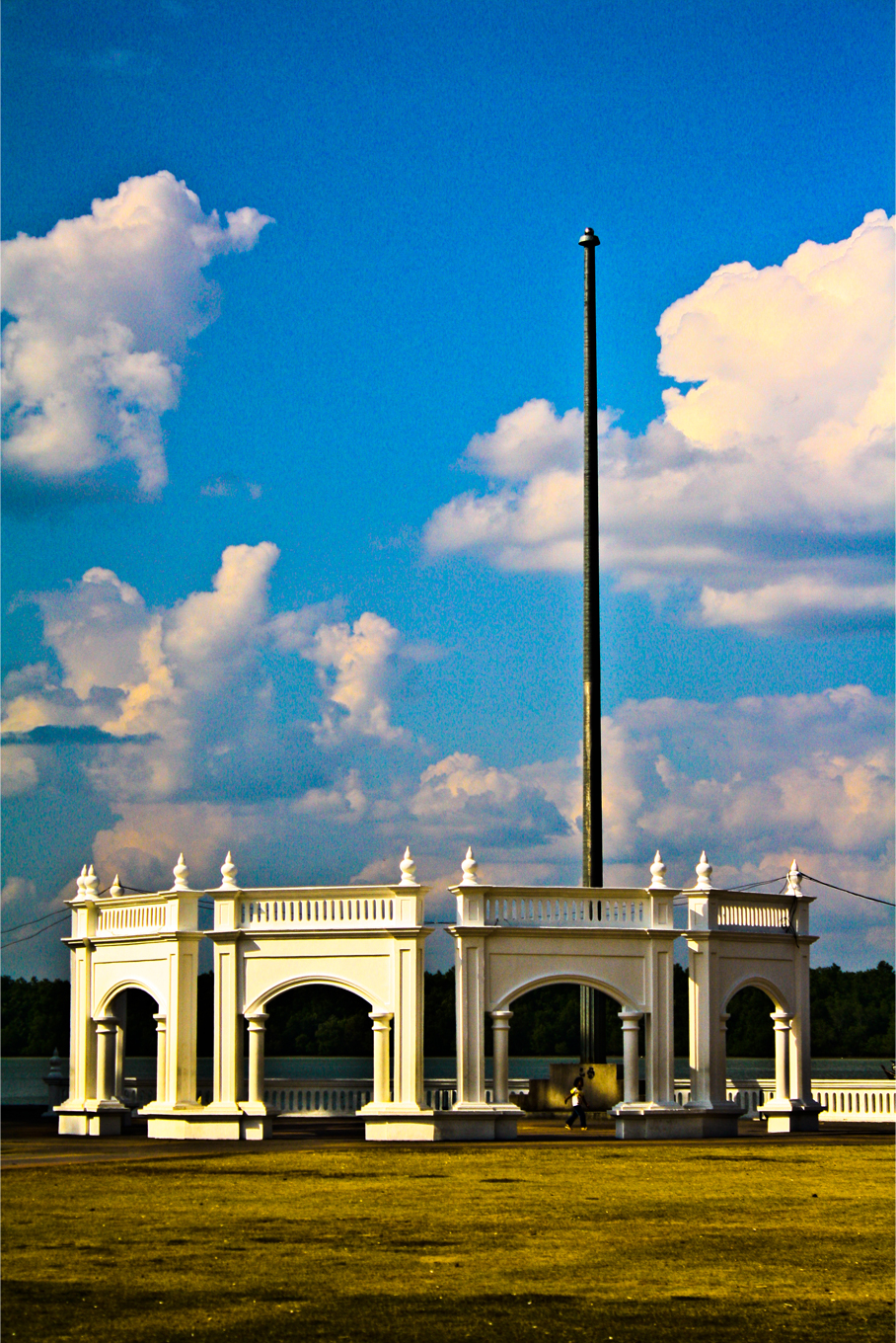 Monumen Tanjung Emas